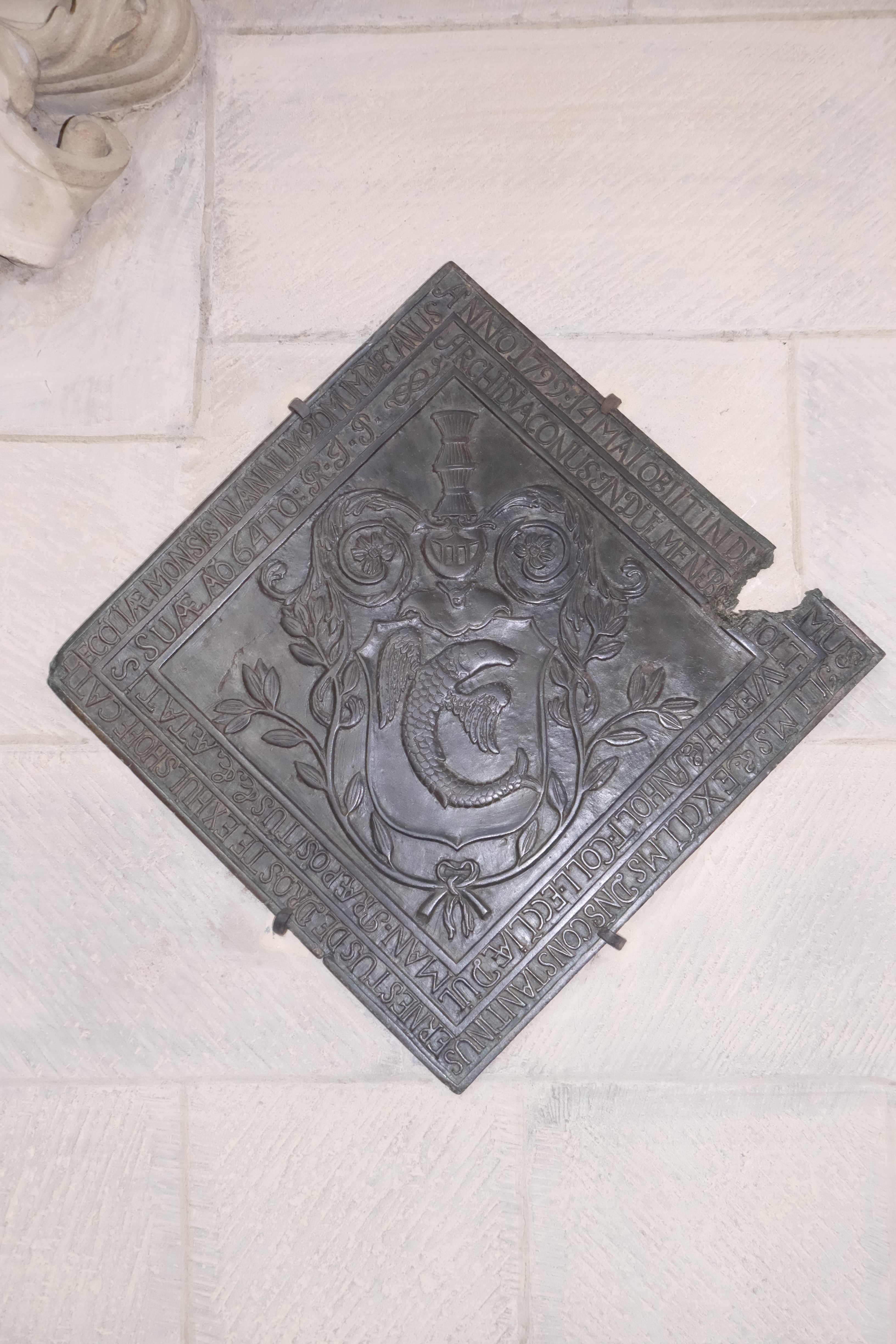 Wappen der Domherrn in Münster; Grabplatte des Domherren Ernst Konstantin von Droste zu Hülshoff